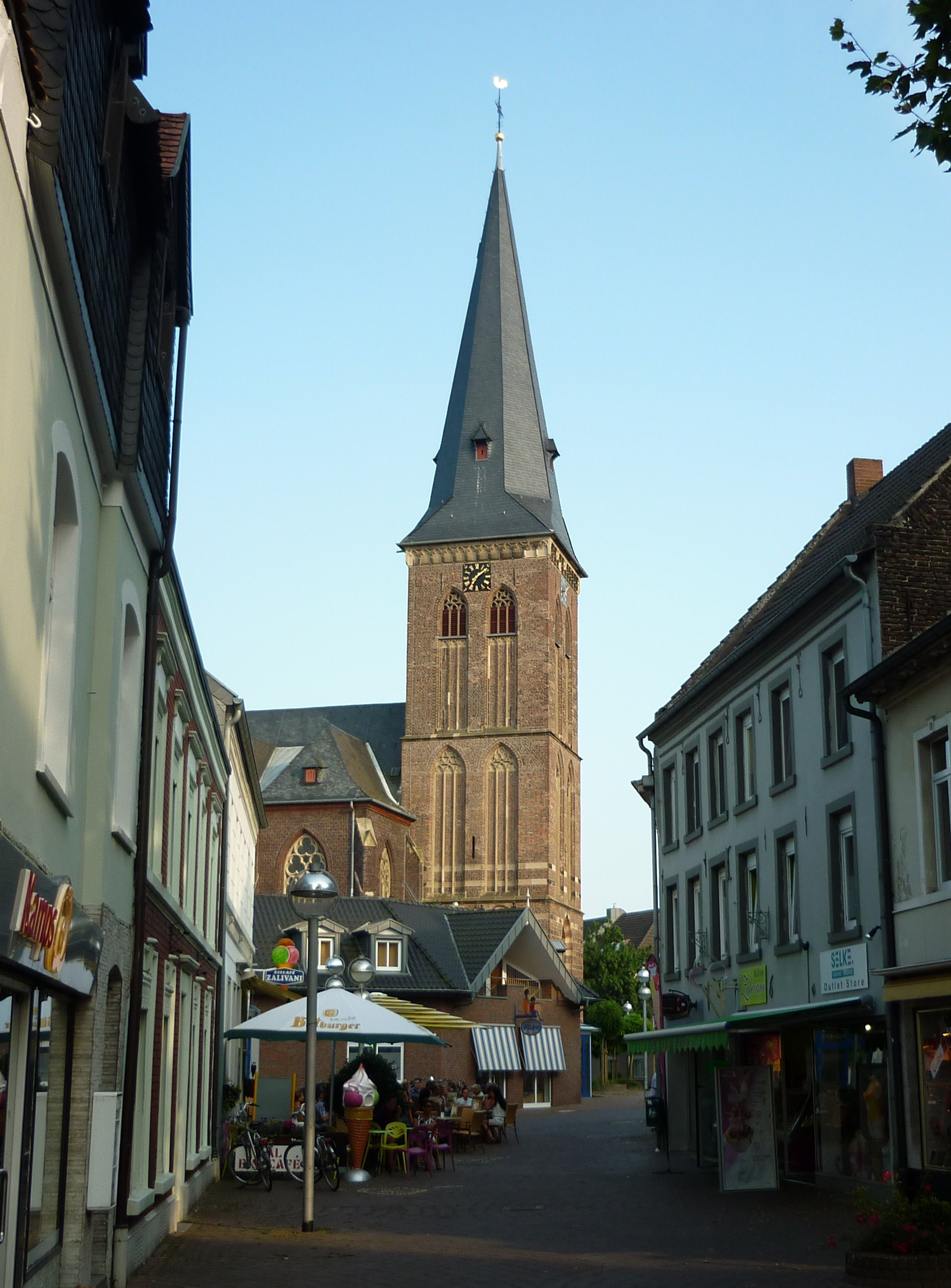 Nettetal-Kaldenkirchen, Kath. Kirche St. Clemens This image shows a heritage building in Germany, located in the North Rhine-Westphalian city Nettetal (no. 114).